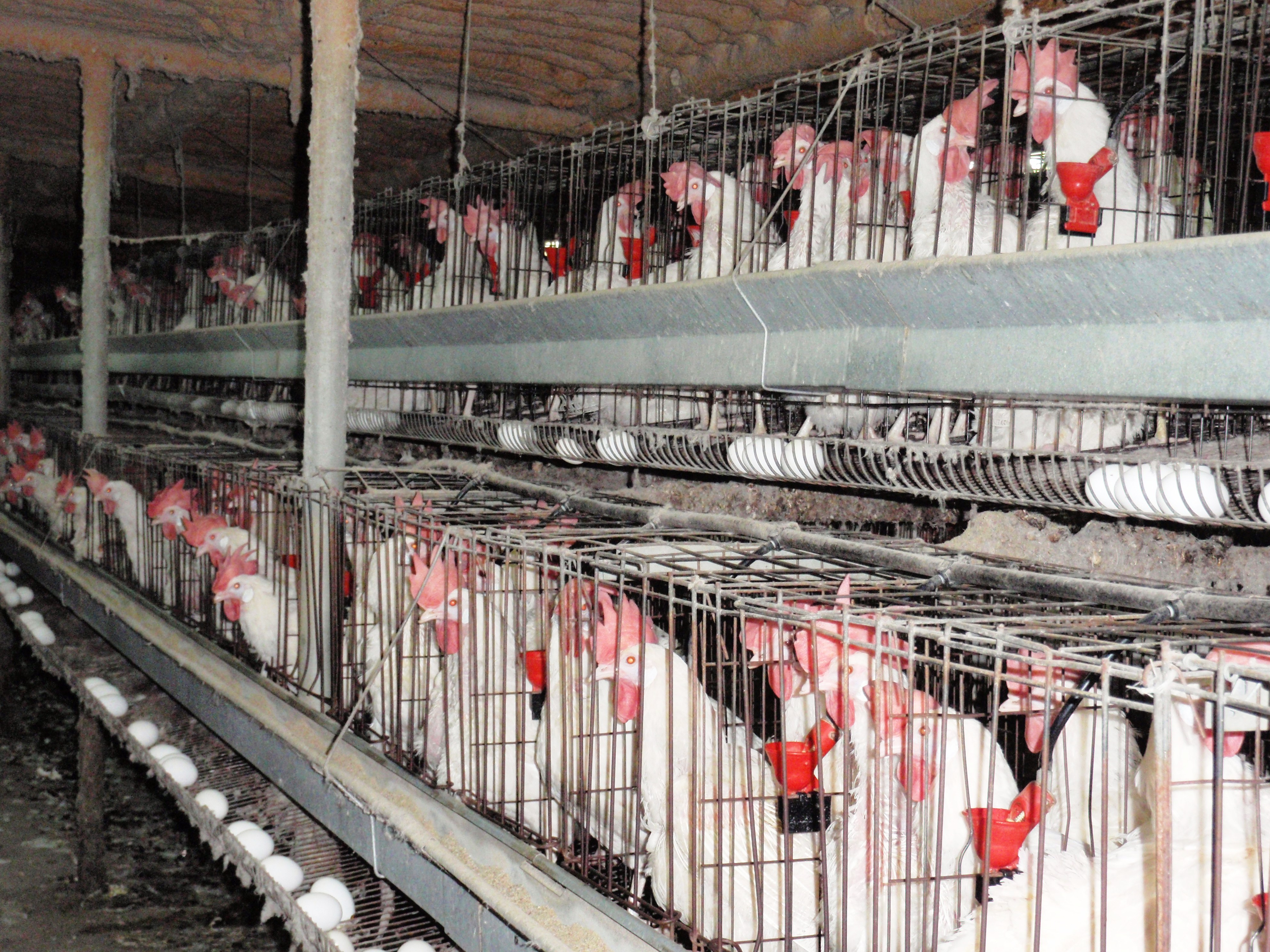 אפיית מצות שמורות Hand working Matza Shmura baking